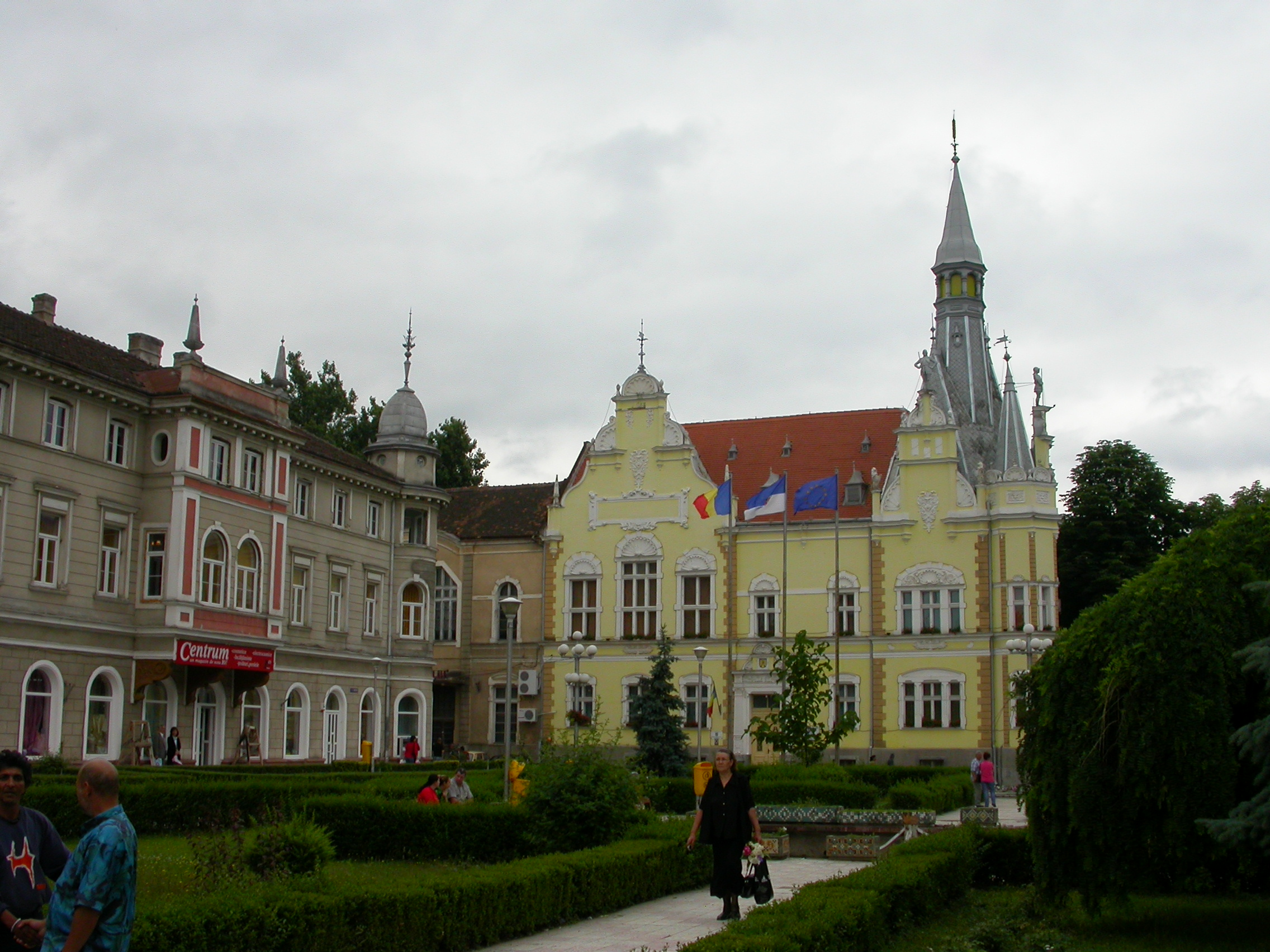 Ansamblul Pieței Revoluției, sec. XIX - 1900 - 1925